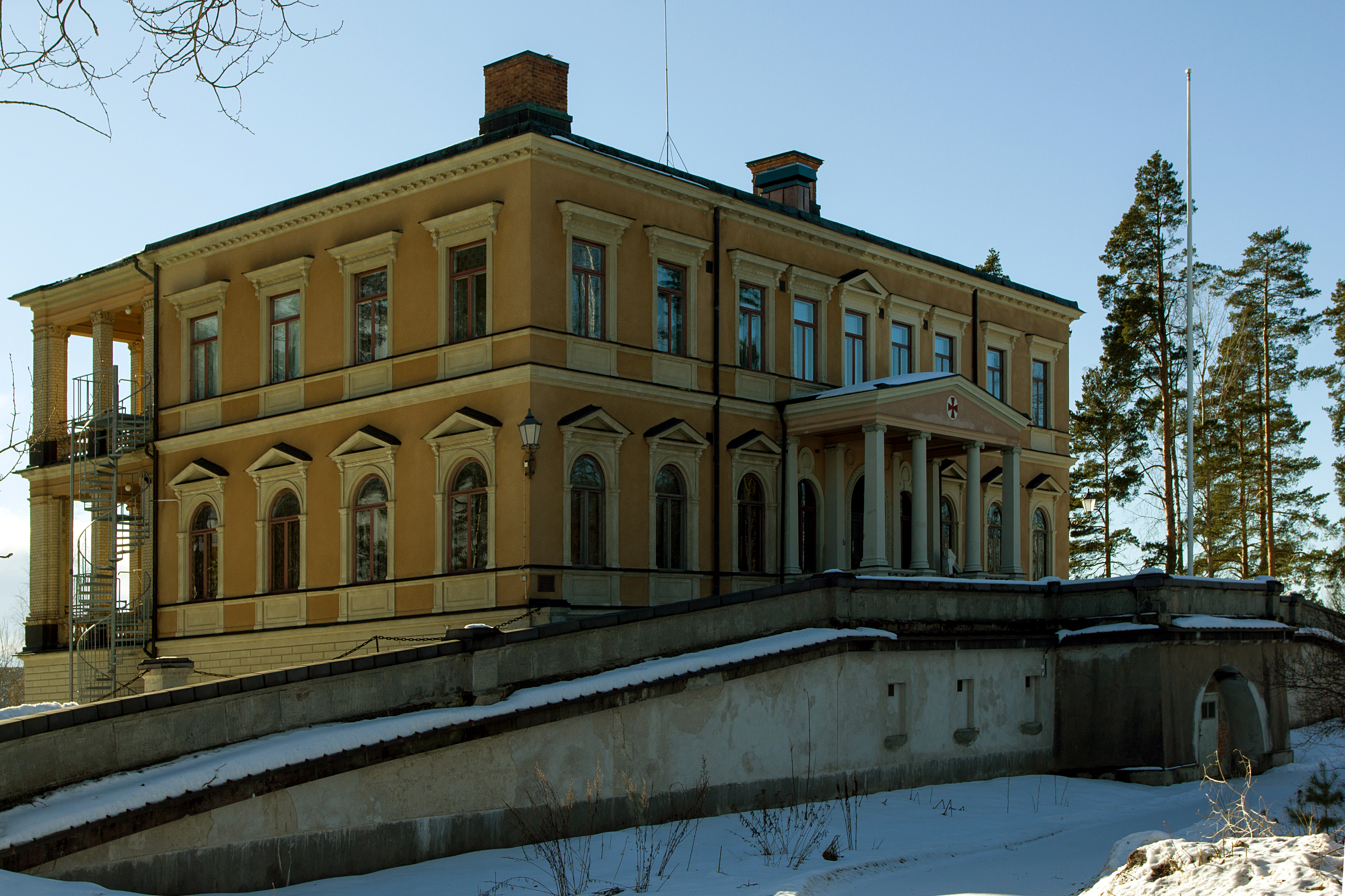 Villa Bergalid, Villastaden, Falun, Dalarna, Sverige. Erik Johan Ljungberg lät bygga huset som bostad åt sig 1902, senare köpte Svenska Frimurare Orden byggnaden och har den som loge.